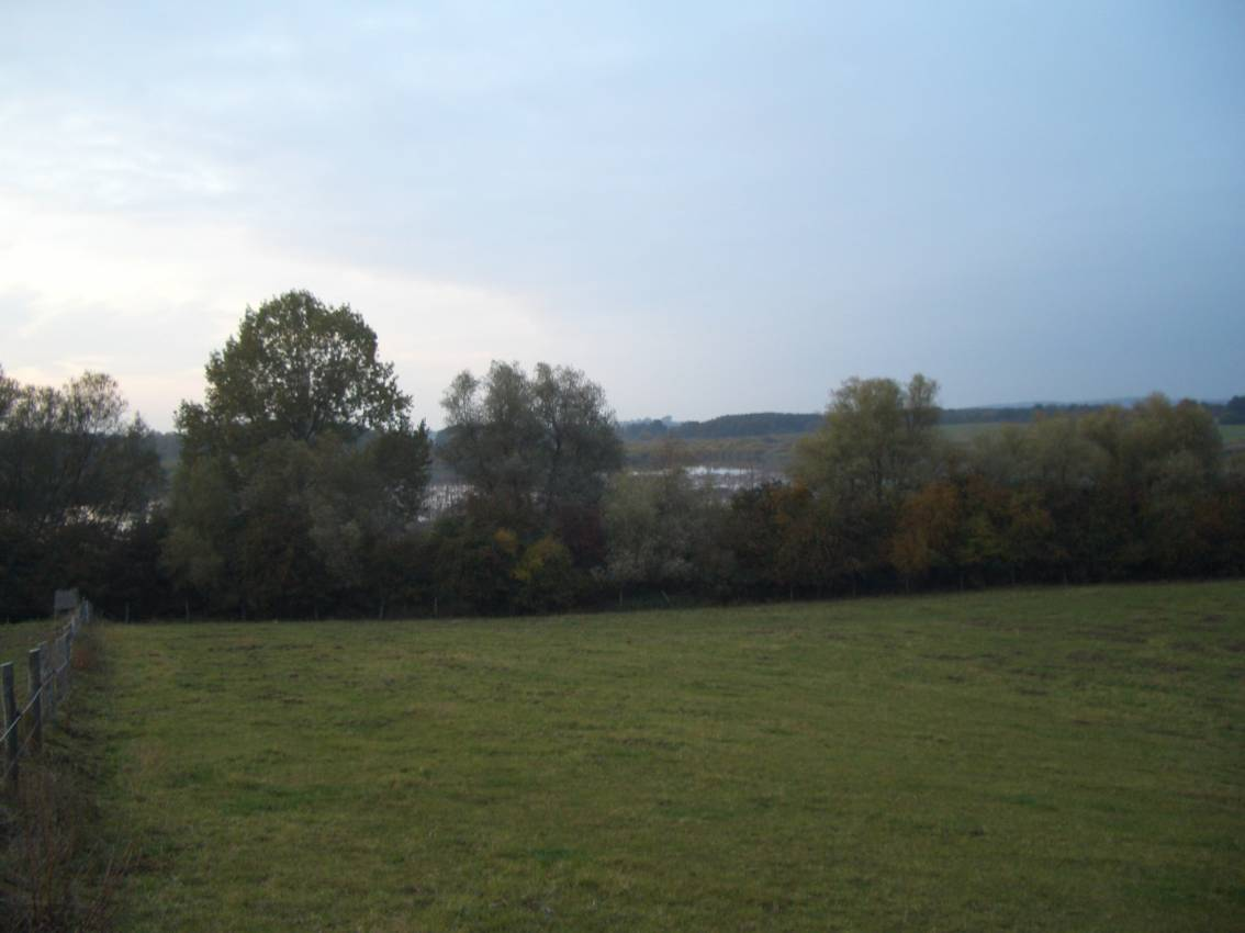 Naturschutzgebiet Lauenhagener See, NW-lich von Strasburg (MV).